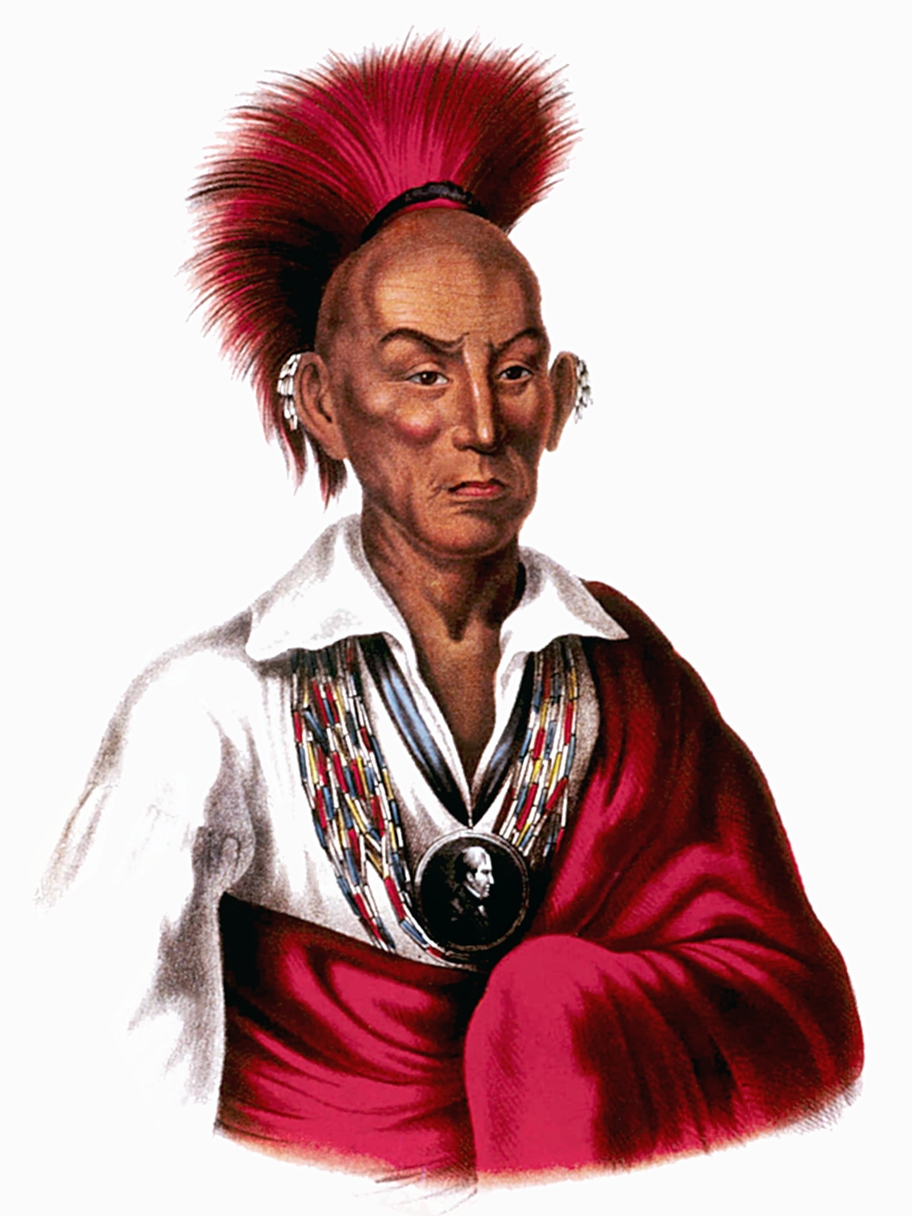 Sauk Chief Makataimeshekiakiah, or Black Hawk